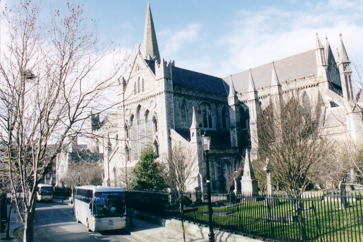 Catedral de San Patricio (exterior).